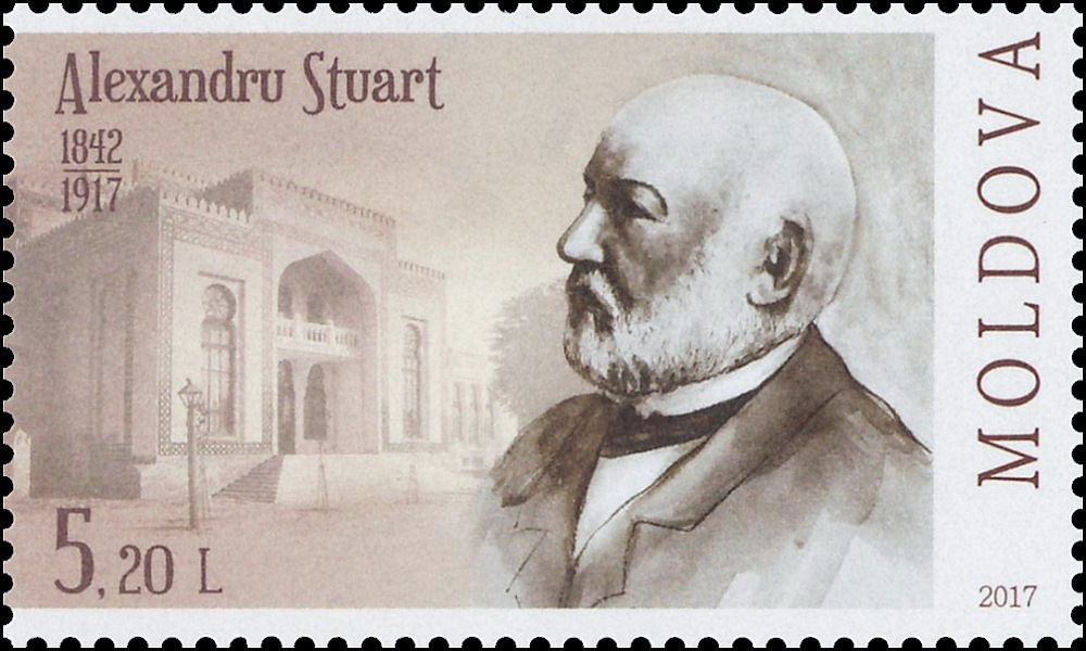 Alexandru Stuart (1842-1917), Scientist, Biologist, Museographer